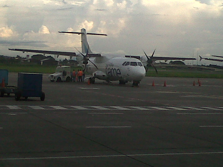 ATR-45 en el aeropuerto de la ciudad de Guayaqquil.